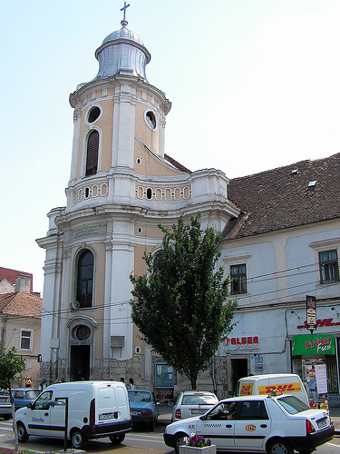 A kolozsvári minorita templom